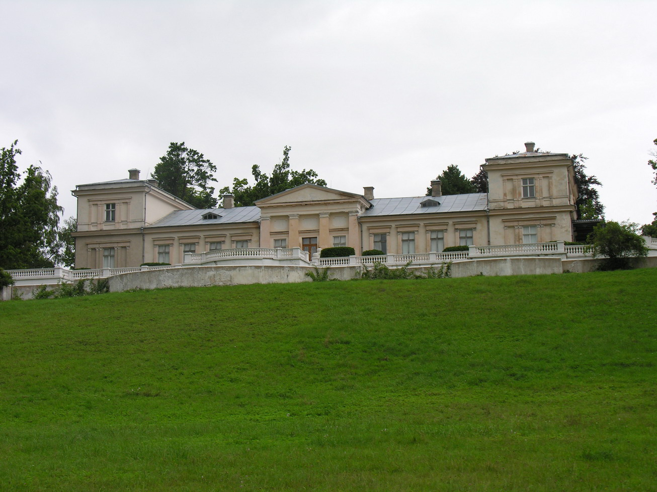 Renavo dvaro rūmai, Mažeikių raj. Foto: Algirdas, 2005 m. rugpjūčio 13 d.